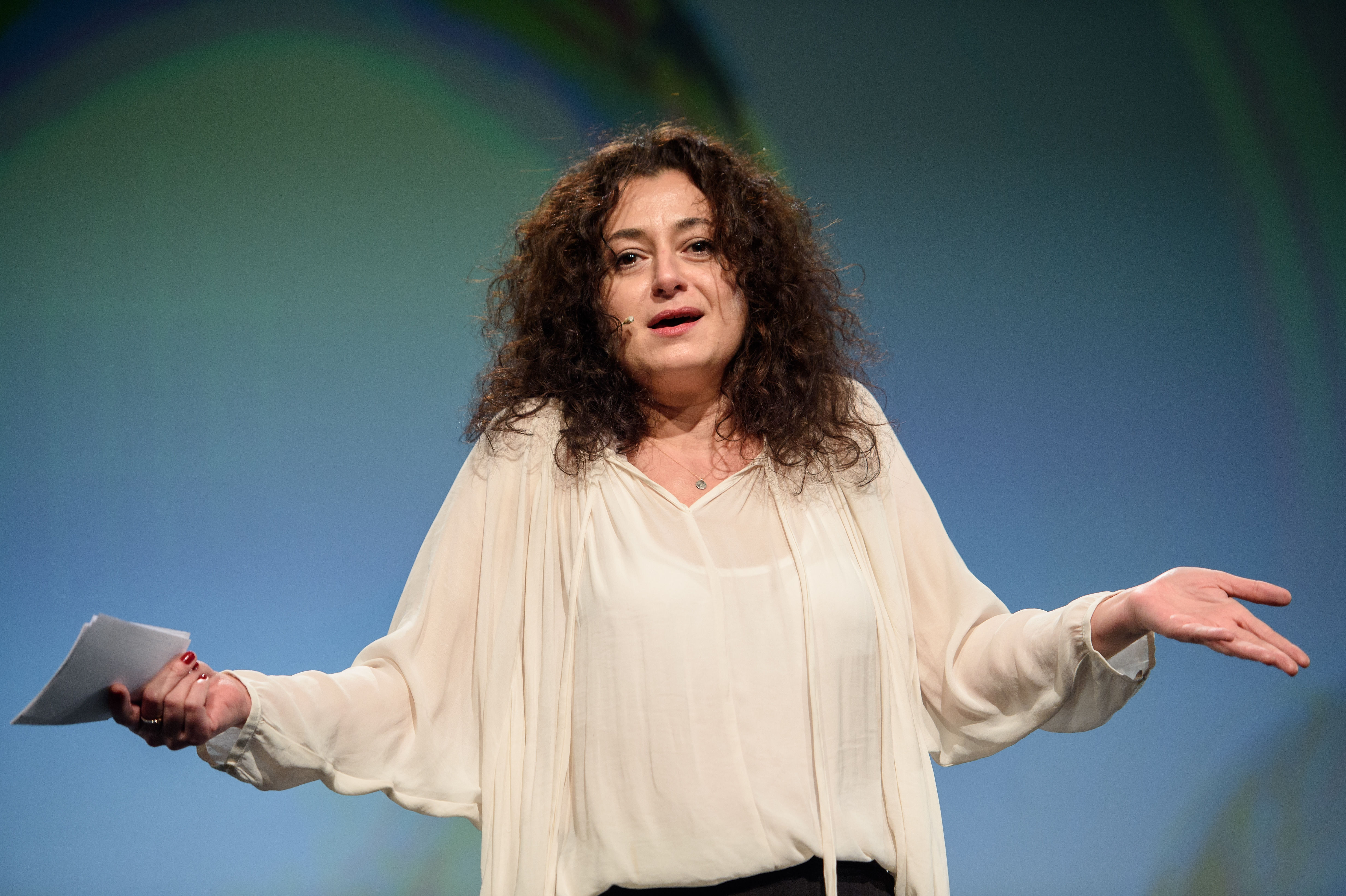 02.05.2018, Berlin: Talk: How to lose a country: The new political Ice Age Speaker: Ece Temelkuran Die re:publica ist eine der weltweit wichtigsten Konferenzen zu den Themen der digitalen Gesellschaft und findet in diesem Jahr vom 02. bis 04. Mai in der STATION-Berlin statt. Foto: Gregor Fischer/re:publica